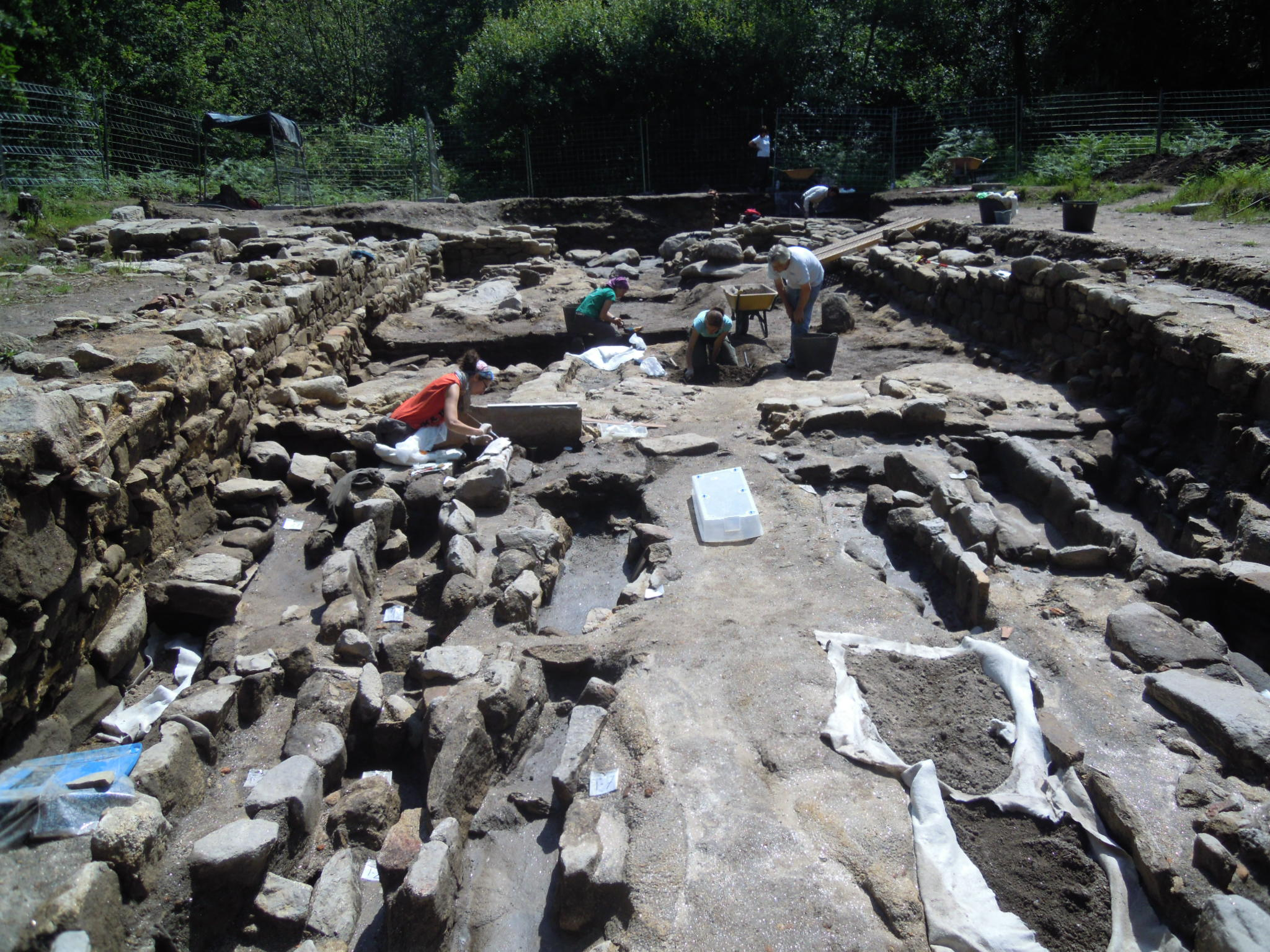 Escavación arqueolóxica da necrópole da igrexa vella de Santa Comba de Louro desde o lado oeste.